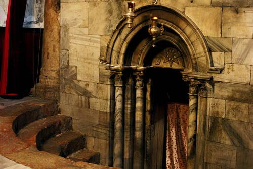 أحد المداخل في كنيسة المهد في بيت لحم، فلسطين